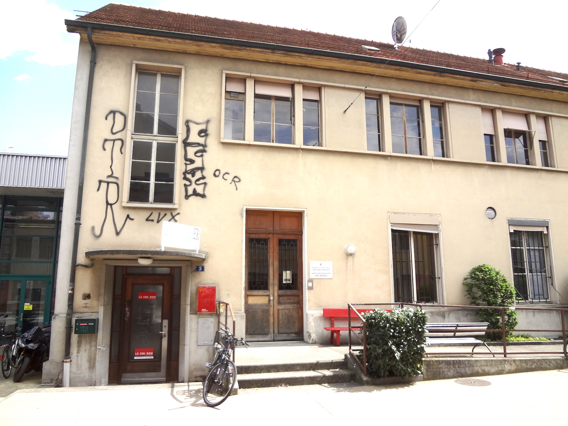 La rédaction du « Courrier » occupe le premier étage de ce bâtiment, 3 rue de la Truite, à la pointe de La Jonction, Genève.